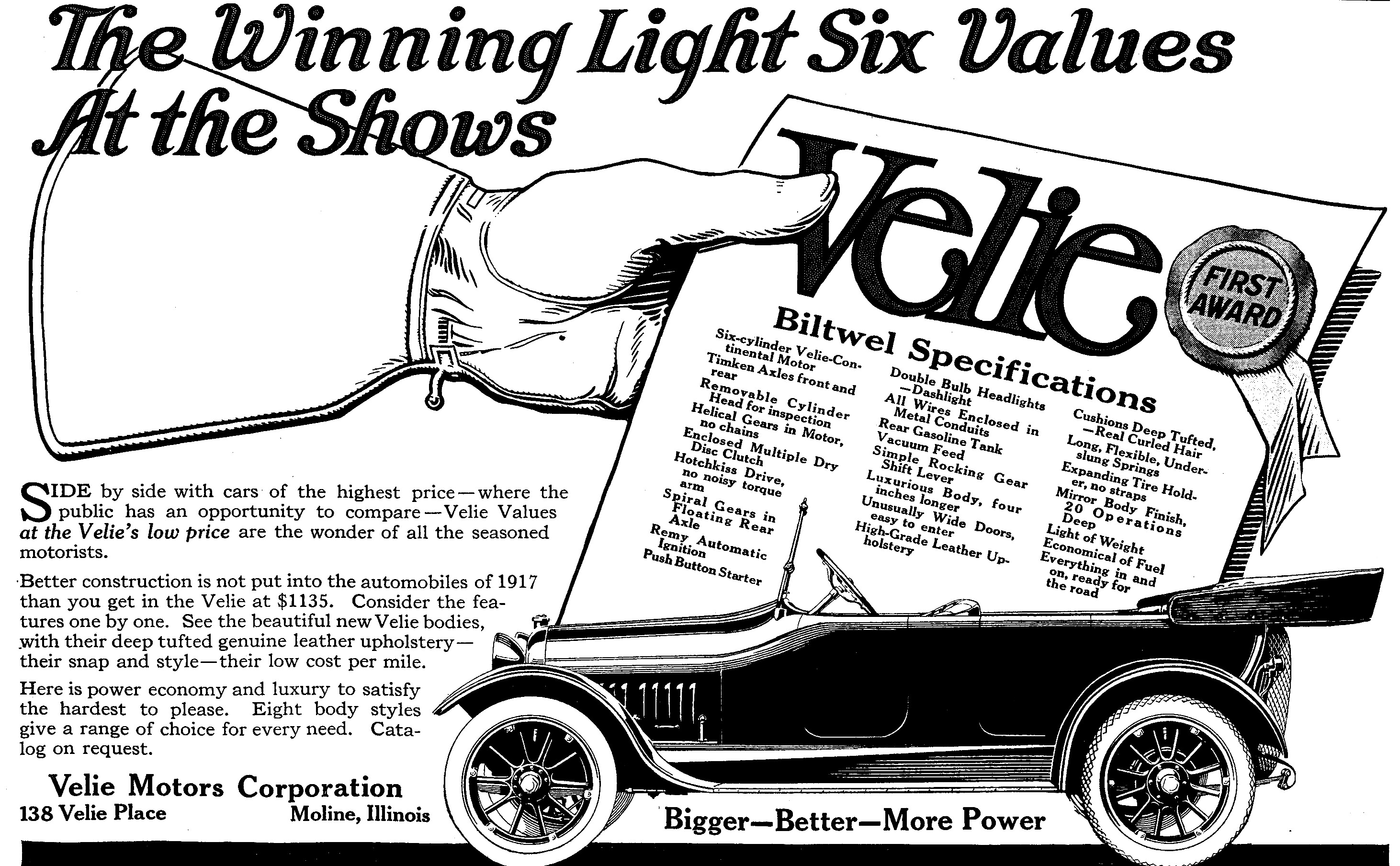 Velie automobile advertisement, 1917